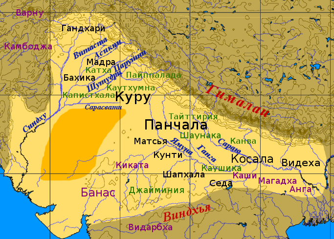 Russian Version